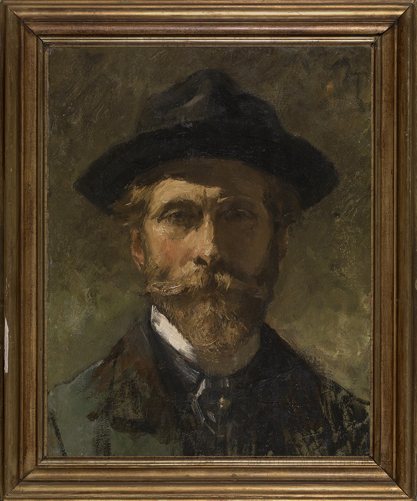 Zelfportret (Emile Verbrugge, circa 1920 - circa 1936); collection: Musea Brugge - Groeningemuseum